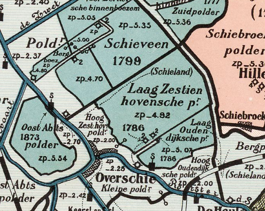 Laag_Zestienhovensche_polder